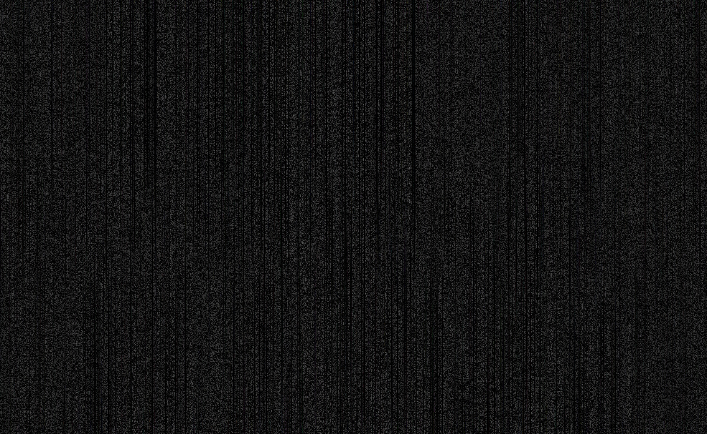 Пример растровой текстуры шума